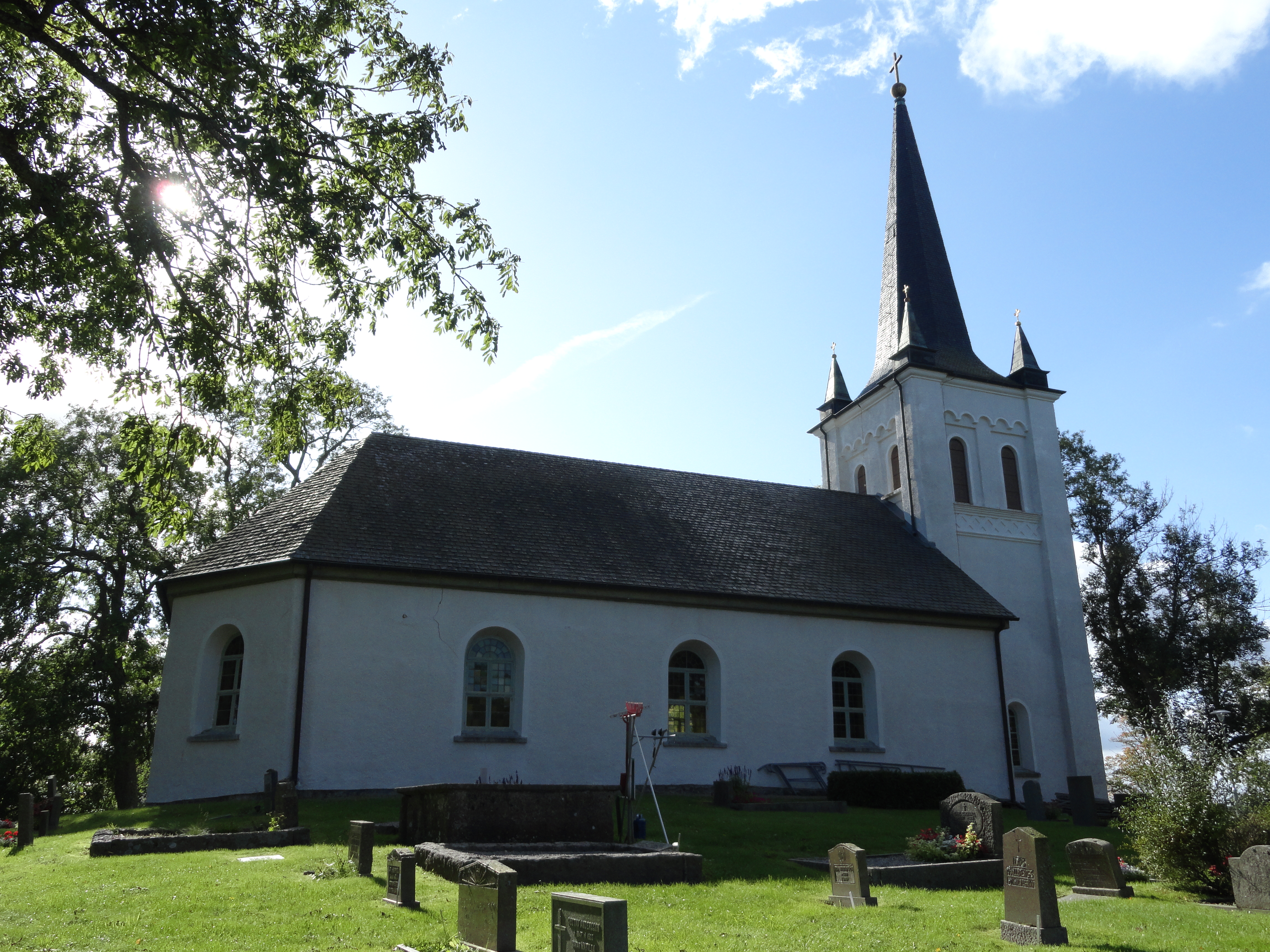 Vänersnäs kyrka (fr NNÖ)